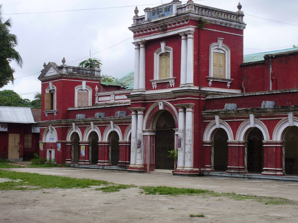 Rangpur Town hall, Bangladesh